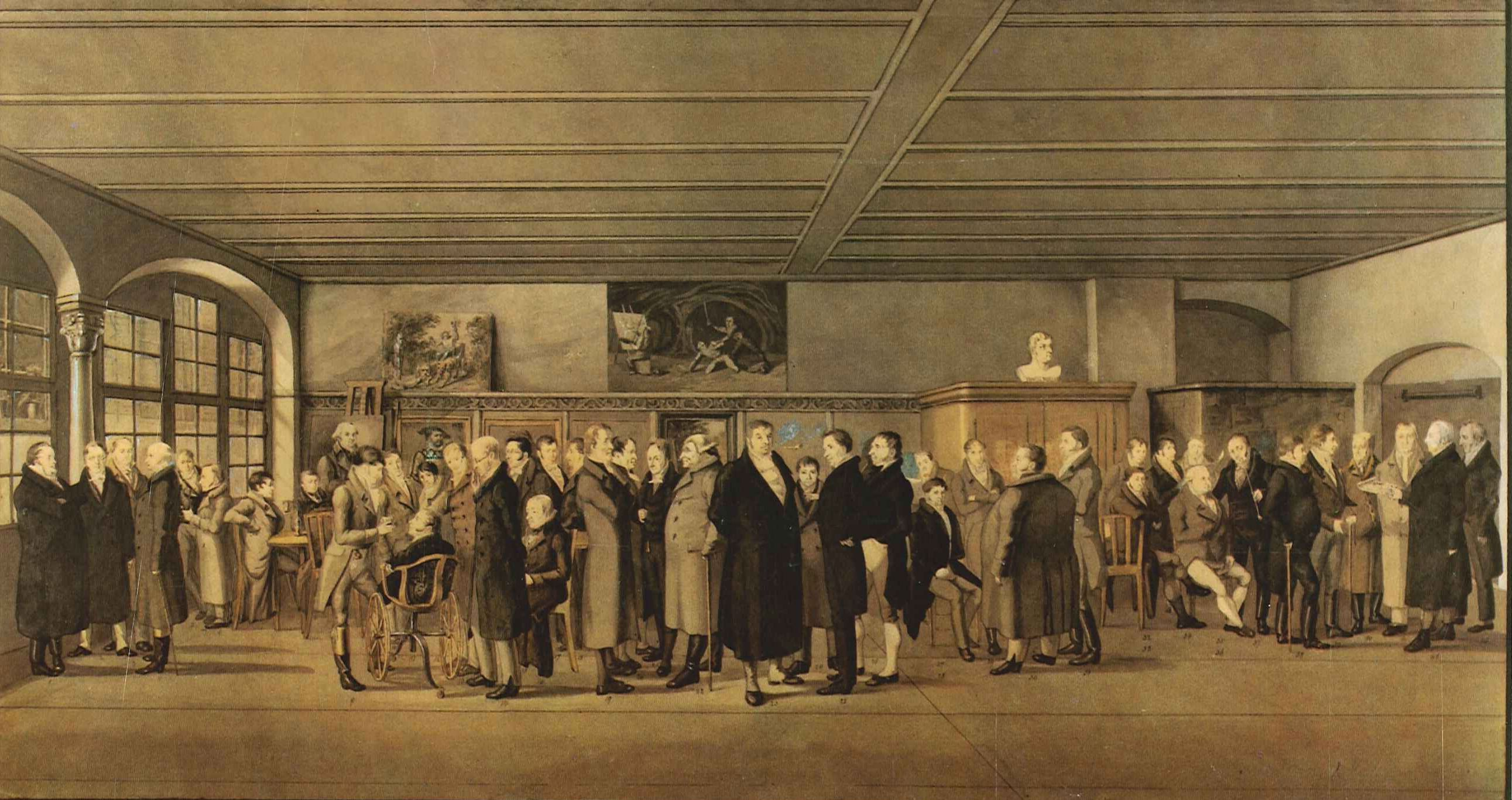 Die 1812 gegründete Basler Künstlergesellschaft in der Stube der Himmelzunft. Die Gesellschaft bestand aus vierzig Künstlern, Architekten, Kunstförderern und Kunstfreunden. Kolorierte Zeichnung von Hieronymus Hess, 1818. Besitz des Basler Kunstvereins, Inv. Nr. 970, Depot im Kunstmuseum Basel.